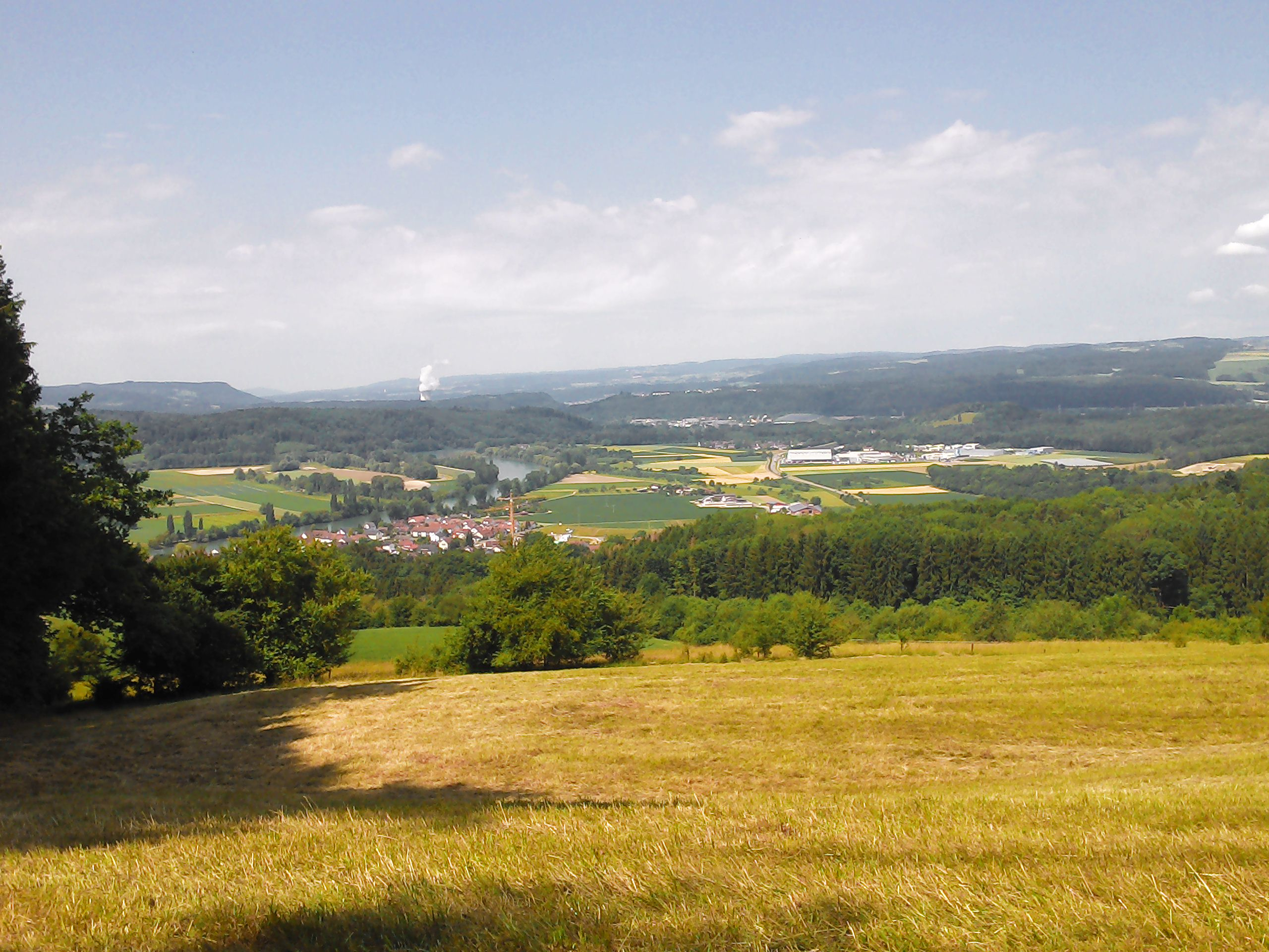 Küssaberg, Gemeinde im Landkreis Waldshut in Baden-Württemberg. Blick von einer Randenhöhe nach Westen, rechts das Gewerbegebiet, im Hintergrund das Schweizer Atomkraftwerk Leibstadt.